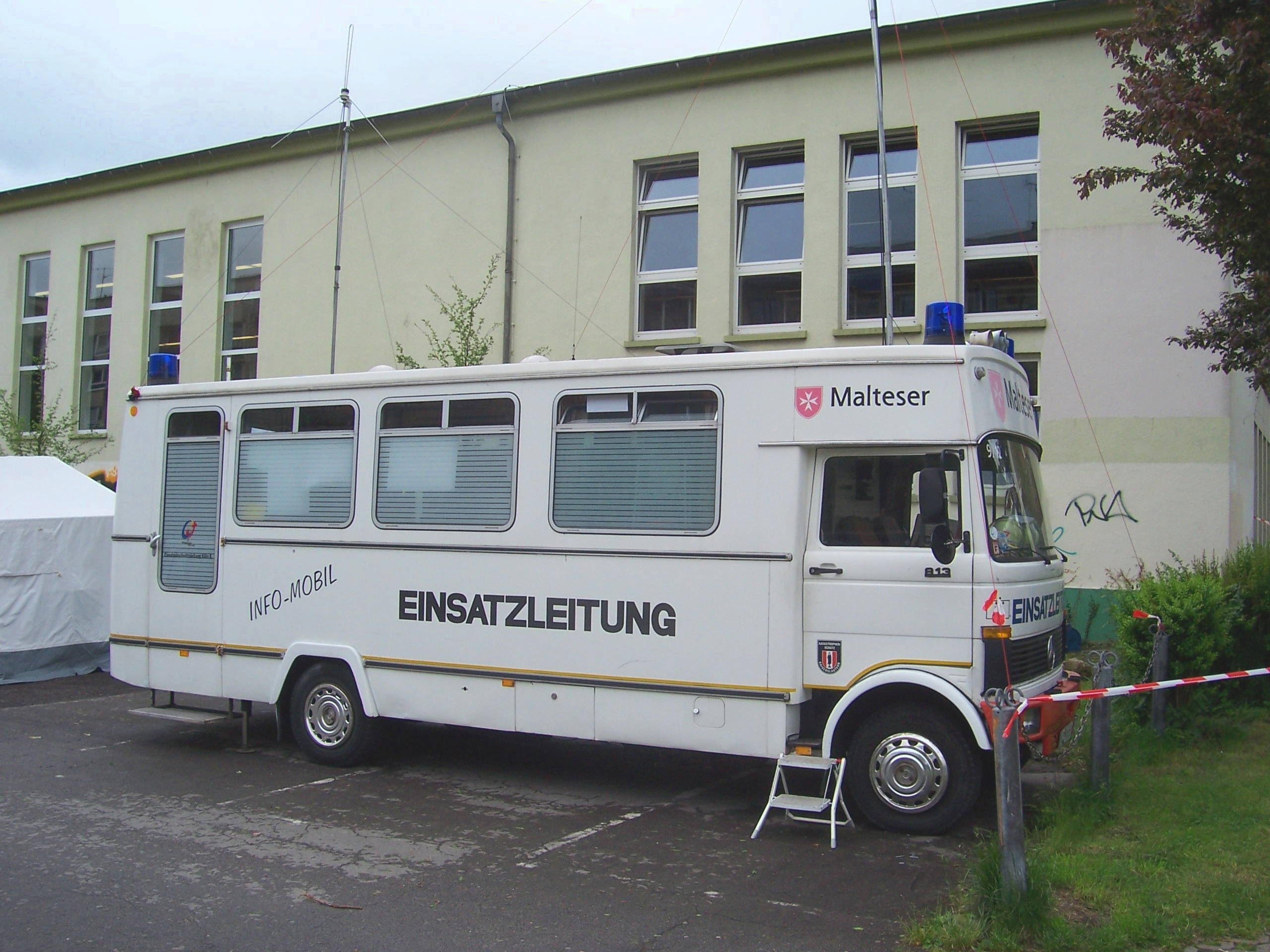 Einsatzleitwagen 2 der Führungsunterstützung des Malteser Hilfsdienstes aus Kaiserslautern